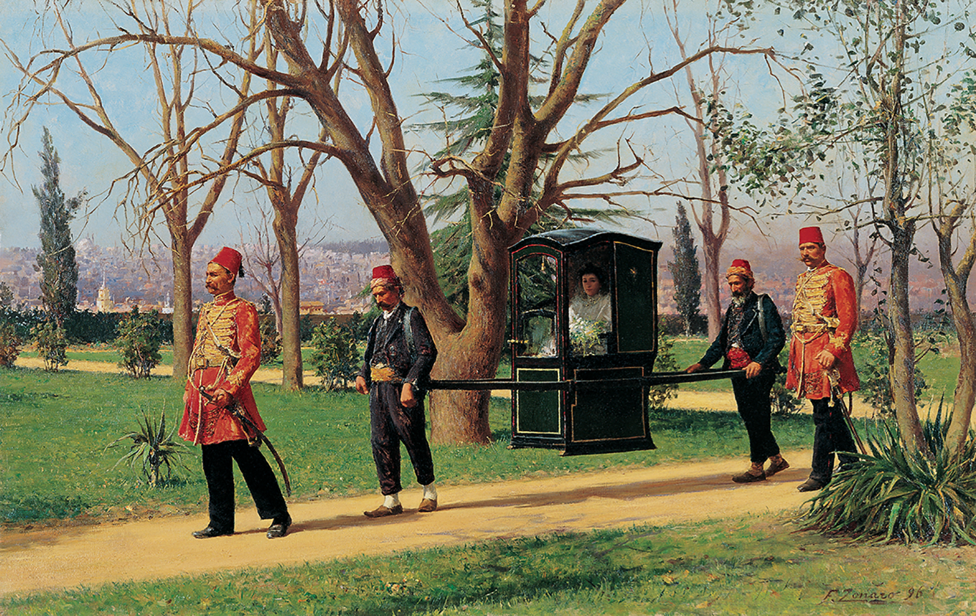 Zonaro’nun, 1896 yılında saray ressamı olana kadar İstanbul’da en çok sipariş aldığı çevre Avrupa elçilikleridir. Zonaro’nun anılarından öğrendiğimize göre bu dönem müşterilerden biri olan İngiliz elçisi Sir Philip W. Currie (1894-96) sanatçıya, bir diplomatla evlenmek üzere olan üvey kızını, düğünün yapılacağı kiliseye taşıyacak tahtırevanda gösteren bir resim ısmarlamış ve resmin arka planında, elçilik bahçesinden görülen Haliç manzarasının yer almasını istemiştir. Tahtırevan taşıyıcıları, süslü giysileri içindeki iki kavas ve duvağıyla tahtırevanda oturan kız, sanatçıya birkaç gün poz vermiştir. Sanatçının eşi Elisa’nın tuttuğu hesap defterlerinde, 1896 Mayıs ayında İngiliz elçisi Sir Philip W. Currie için 42.27 Lira karşılığında, bir yağlıboya ve bir de suluboya resim yapıldığı görülür. Bu resim sözü edilen yağlıboya tablo olmalıdır.